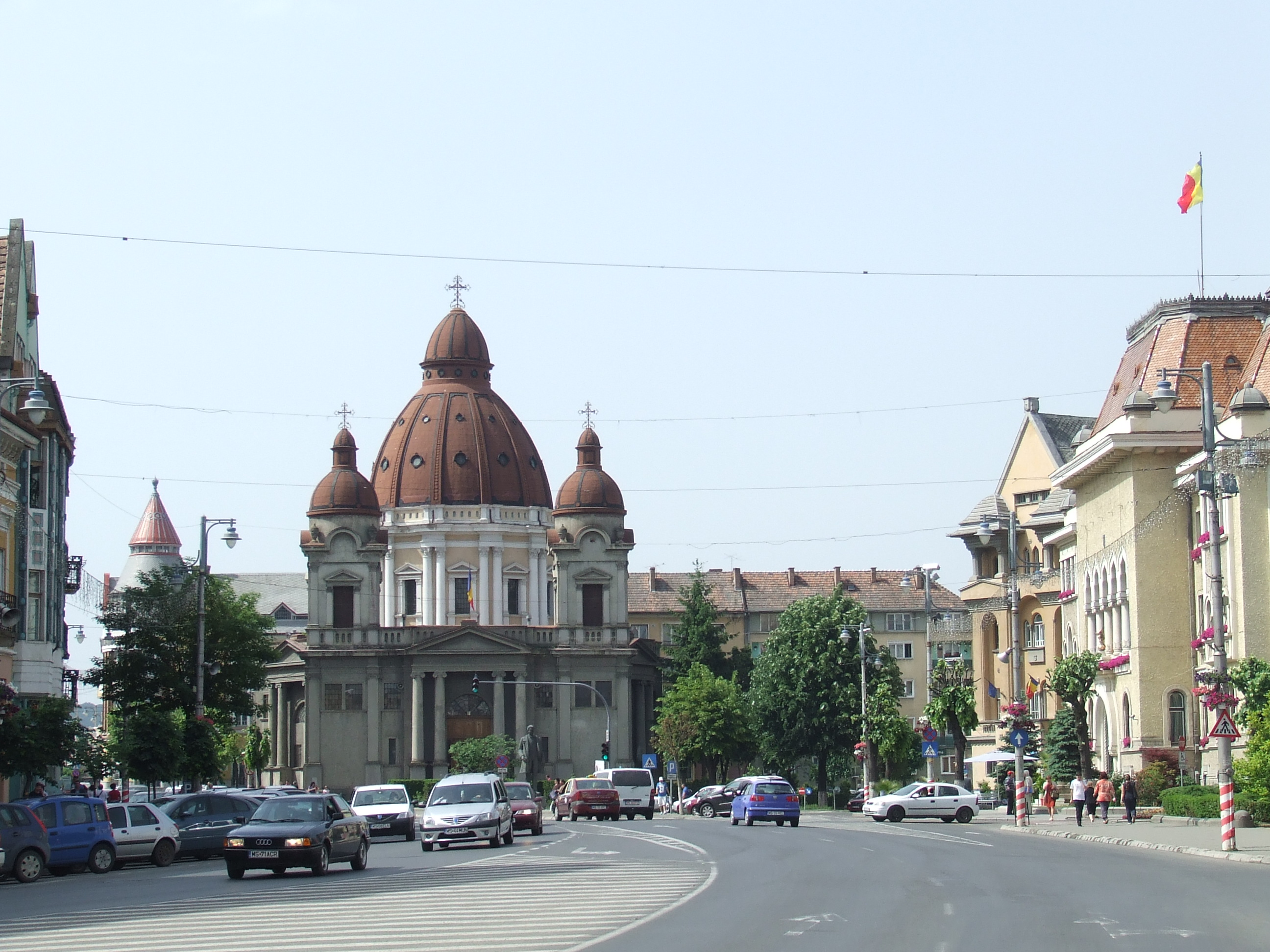 Marosvásárhely